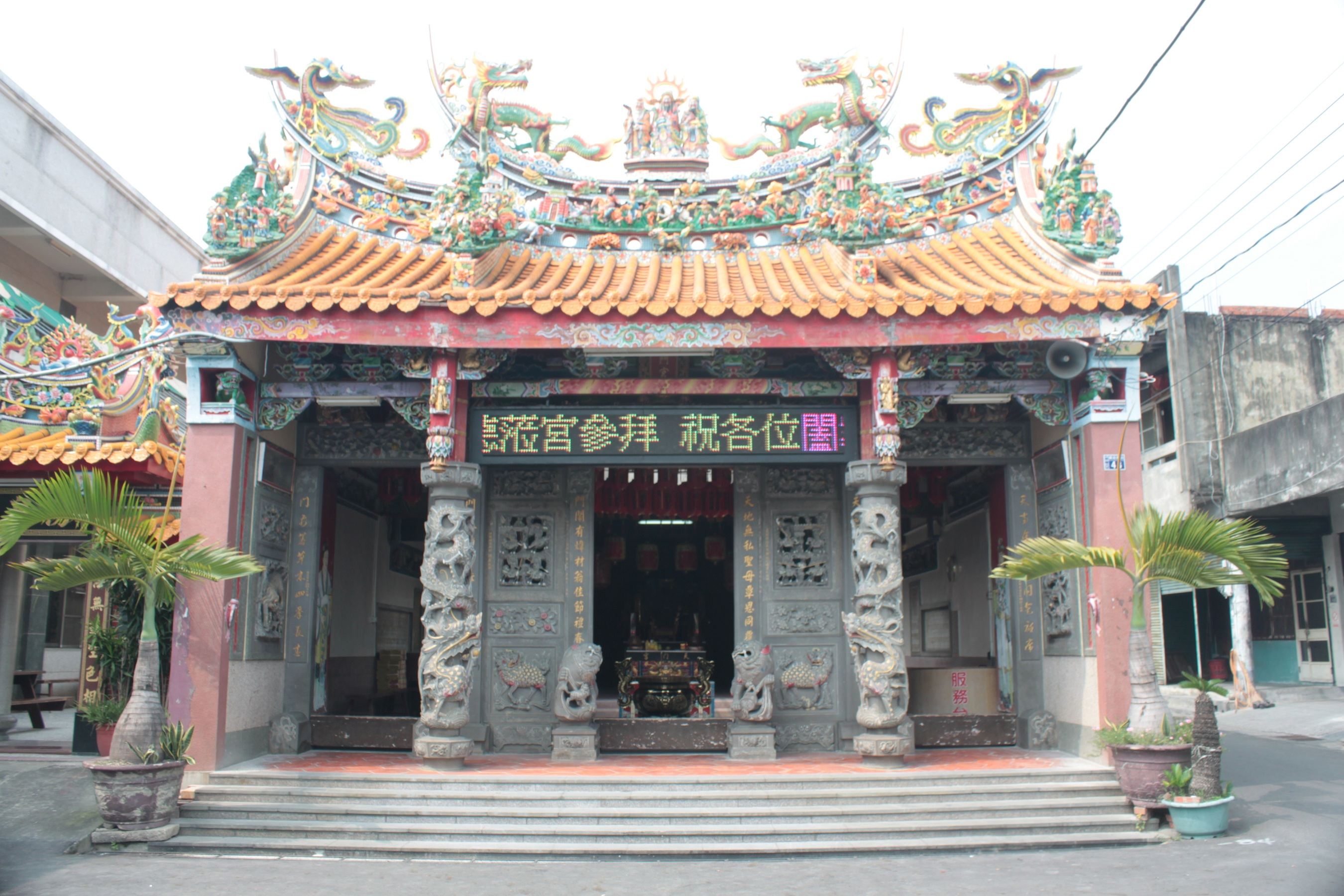 中文（台灣）: 位於彰化縣社頭鄉